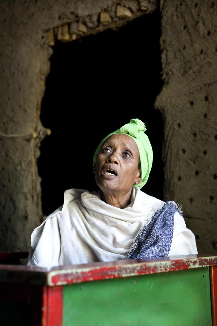 Ethiopian Storyteller